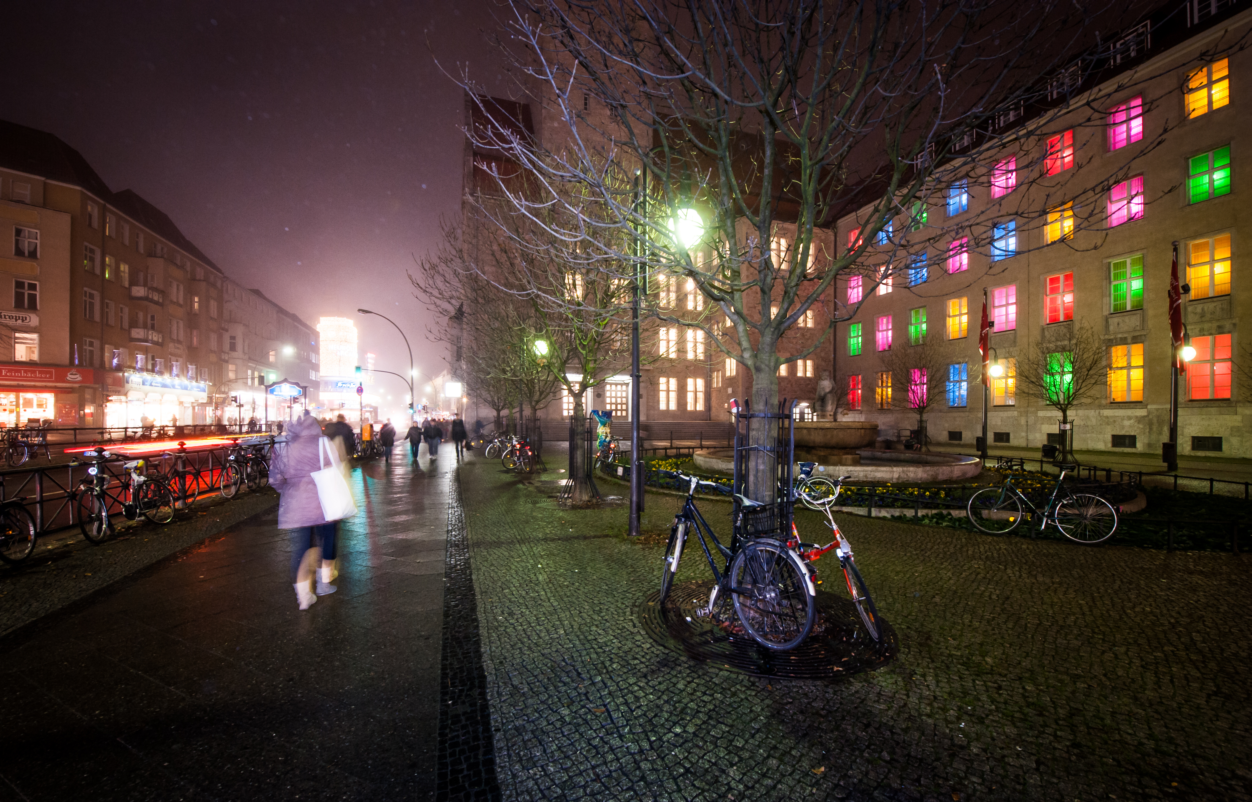 Blick auf die Karl-Marx-Straße am Abend